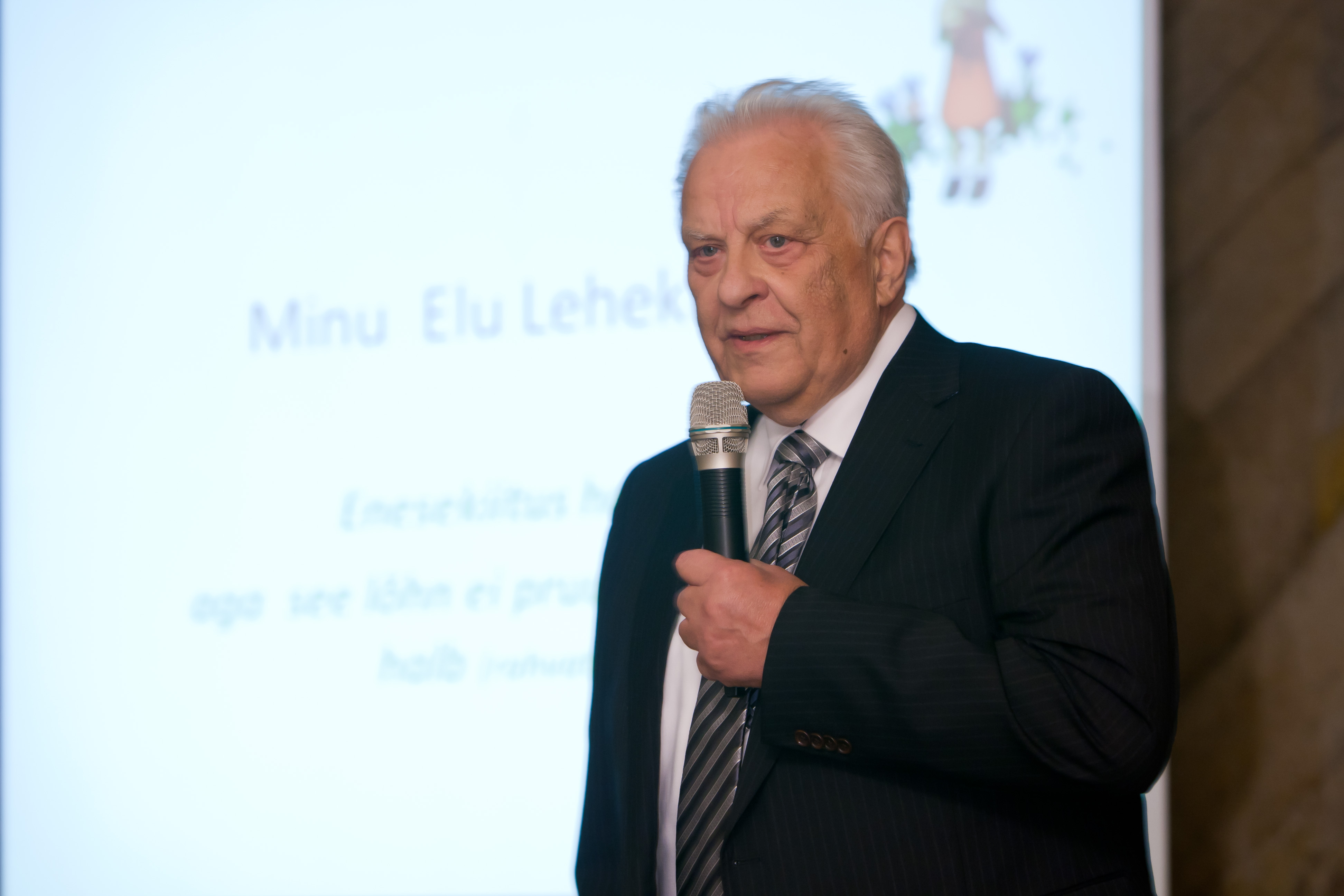 Tartu Ülikooli emeriitprofessori Raul Talviku 75. sünnipäeva tähistamine TÜ ülikooli ajaloo muuseumis 16. oktoobril 2010.